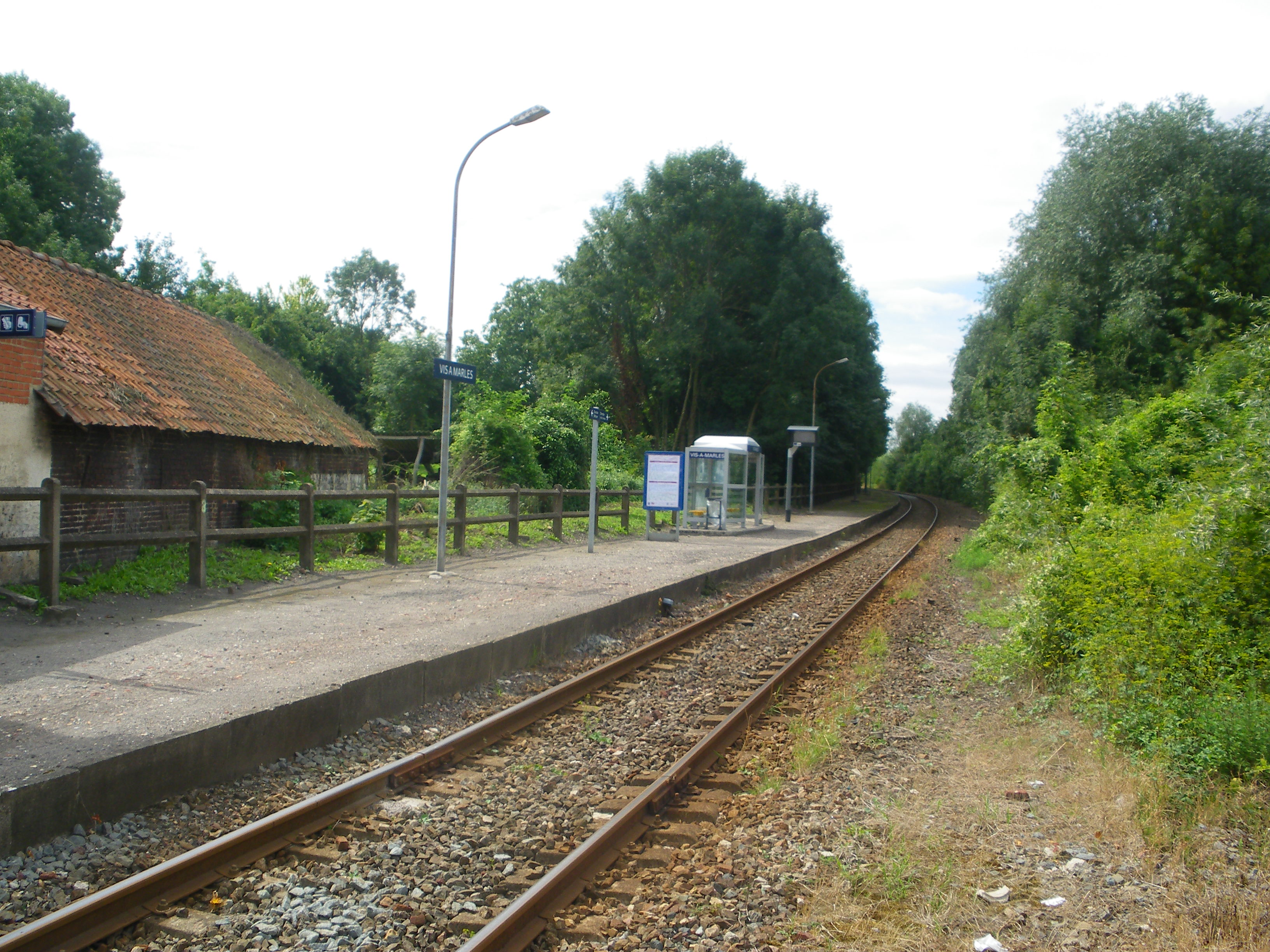 Vue de la gare de Vis-à-Marles.